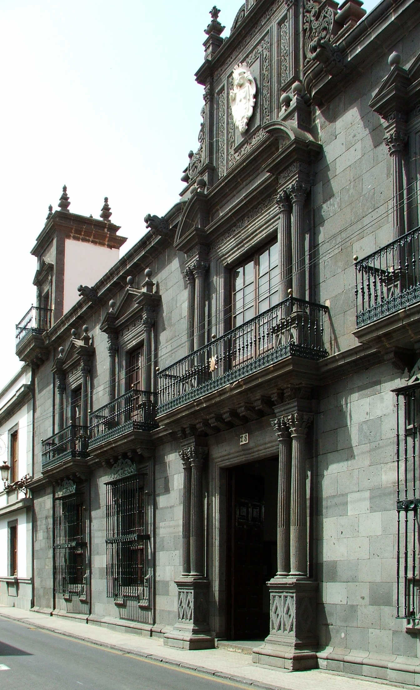 Casa Salazar antes del incendio, La Laguna